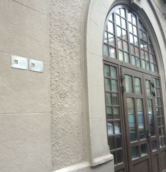 Памятные знаки проекта "Последний адрес" по адресу Москва, ул.Машкова, д. 16